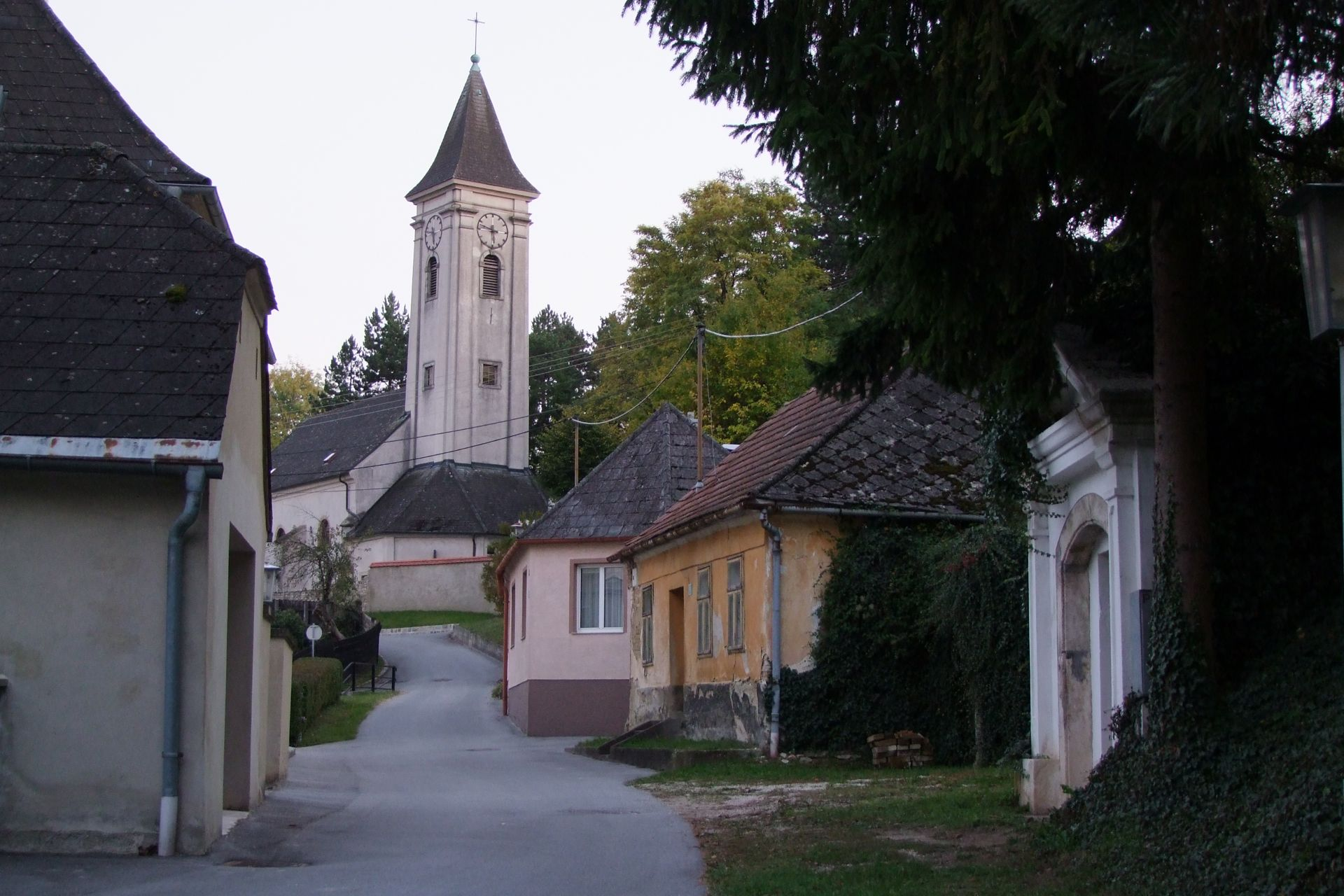 Kath. Pfarrkirche Maria Trost